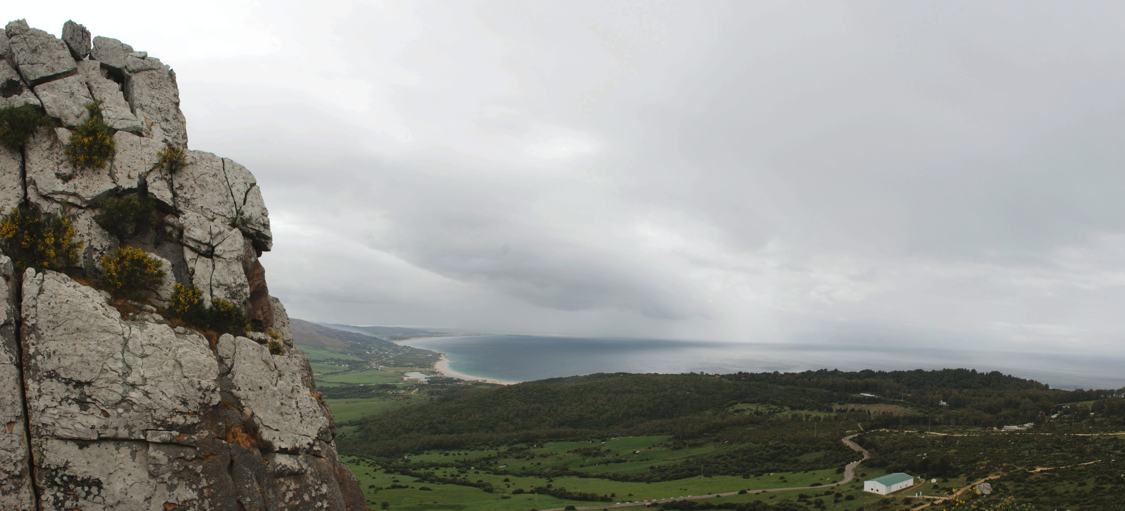 Vista de Valdevaqueros